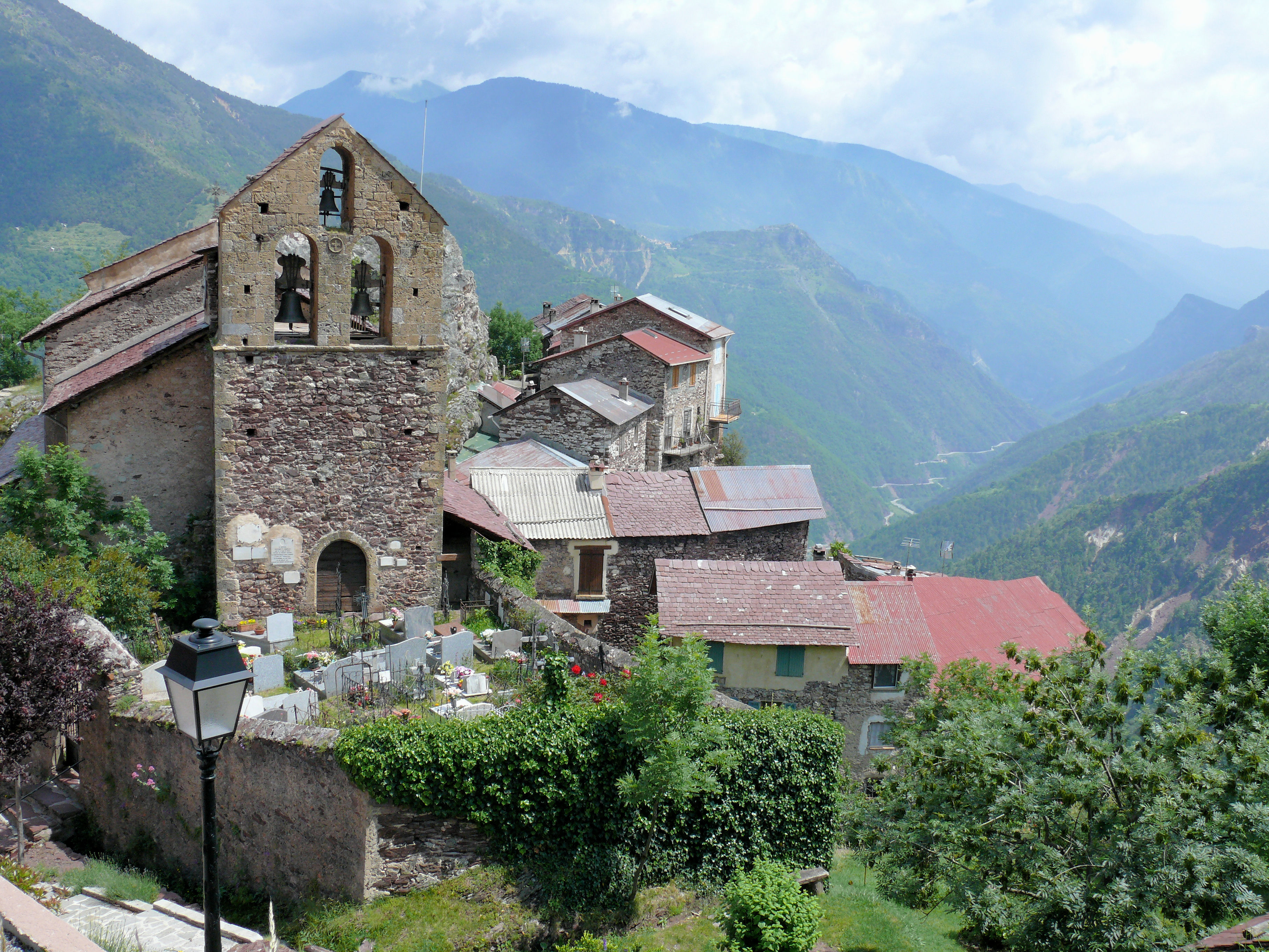 Roure - L'église et le village dominant la vallée de la Tinée